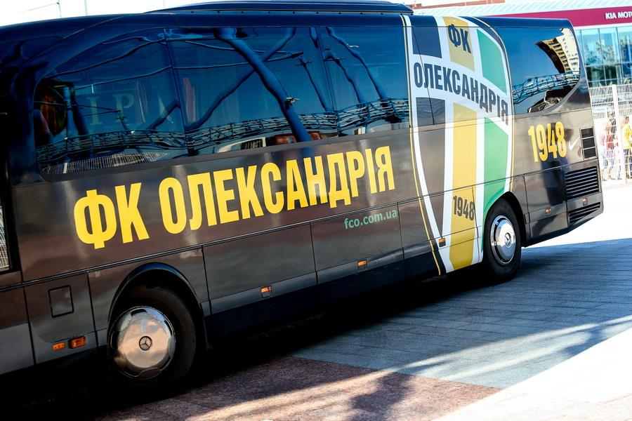 Клубний автобус ФК Олександрія